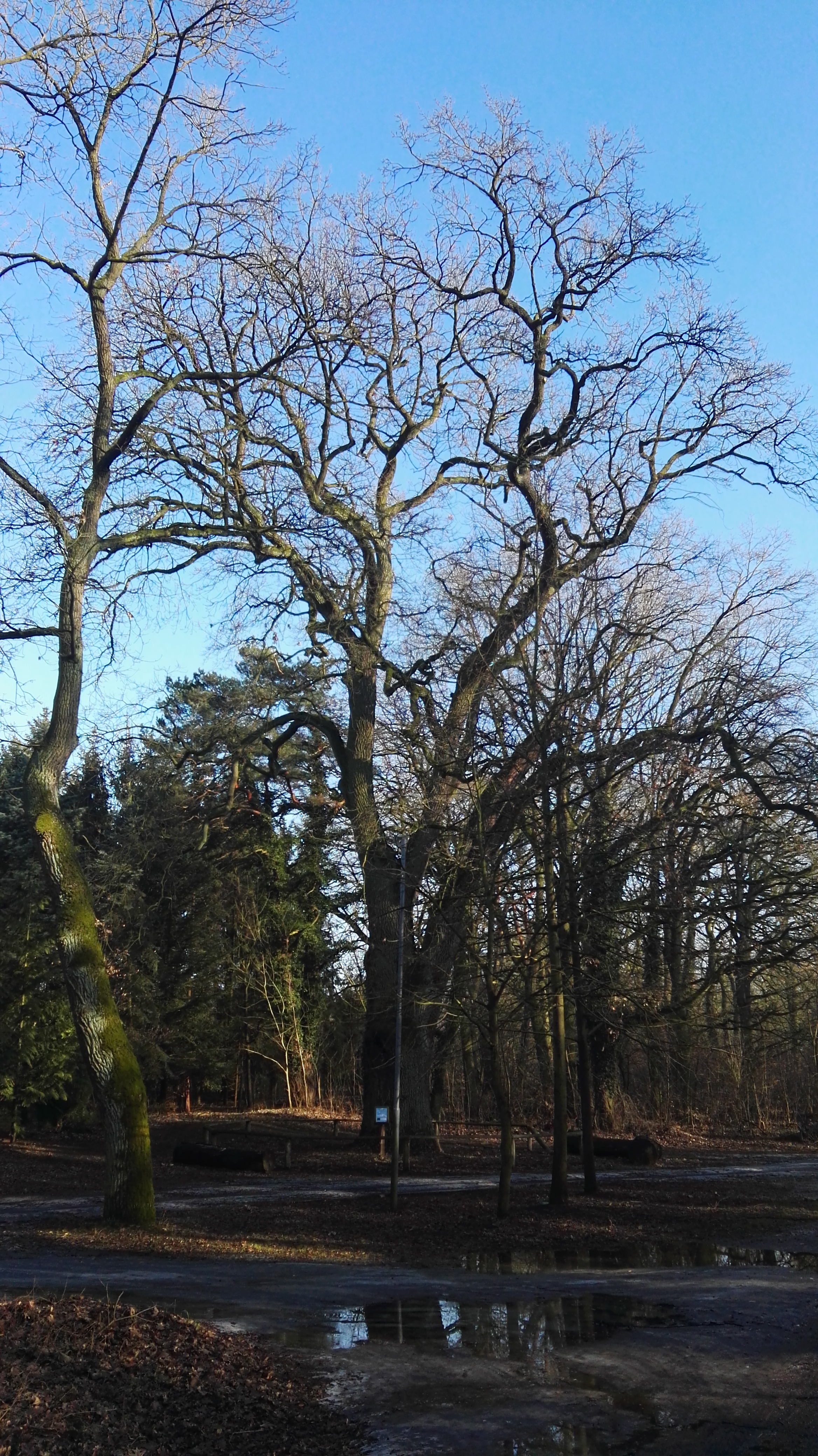 Förstereieiche in Haage, Naturdenkmal